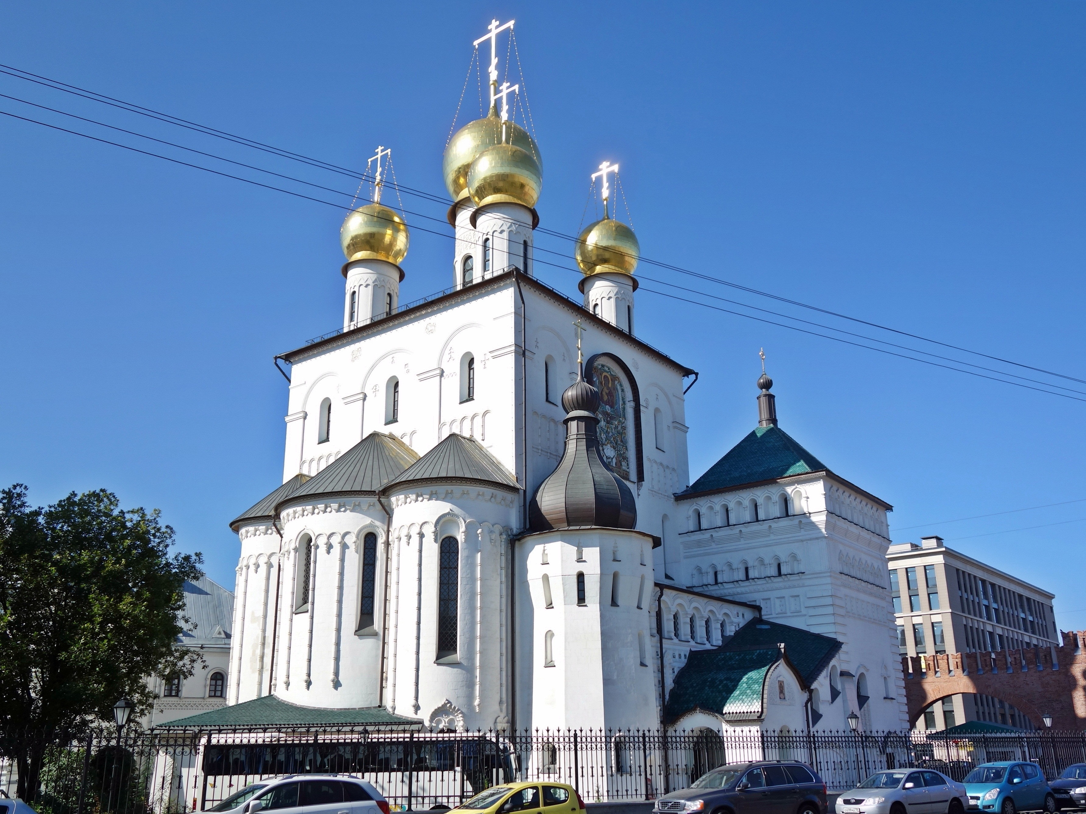 Собор: переулок Товарный, 1-б, улица Полтавская, 7, Центральный район, Санкт-Петербург